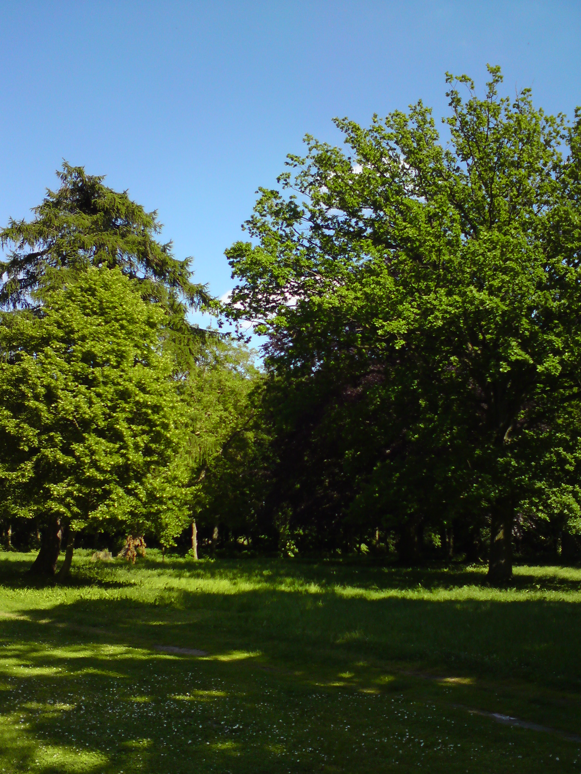 Medrower Park, Landkreis Demmin, Mecklenburg-Vorpommern